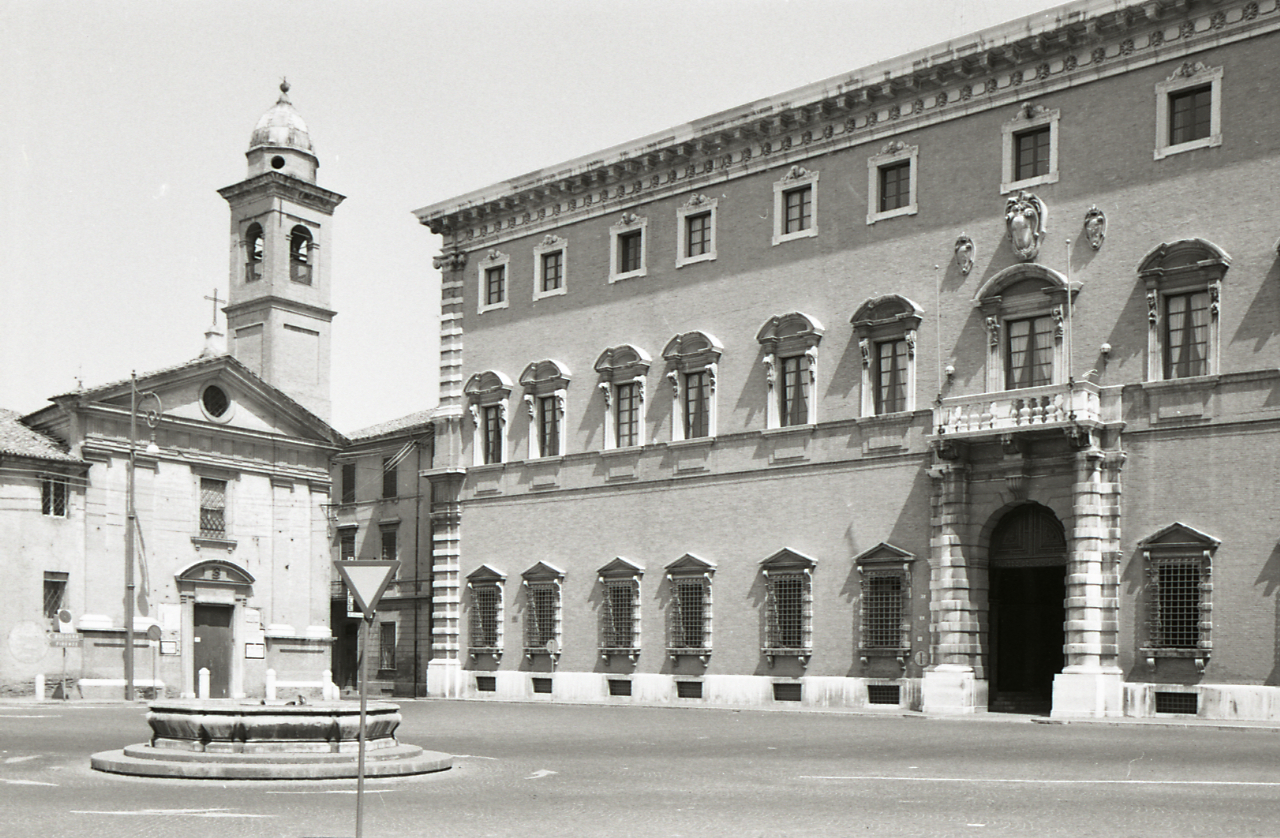 Servizio fotografico : Forlì, 1971 / Paolo Monti. - Strisce: 7, Fotogrammi complessivi: 37 : Negativo b/n, gelatina bromuro d'argento/ pellicola ; 35 mm. - ((Sul portanegativi: NIKMAT FP4. - N.B. Possibile sottoserie (1):. - - Ricerche personali: muri. - Occasione: Campagna di rilevamento del centro storico. - Fonte: Agenda di Paolo Monti: Leica 1501-3000 Controllo numerazione (1950-1978), presso Archivio Paolo Monti. - Fonte: Fattura di Paolo Monti: IV. Commesse/ Fattura/ Rilevamento fotografico del centro storico di Forlì (1971/10/18), presso Archivio Paolo Monti. N. 525 riprese fotografiche stampate in formato 24x30; n. 236 diapositive a colori Ektachrome formato 35mm